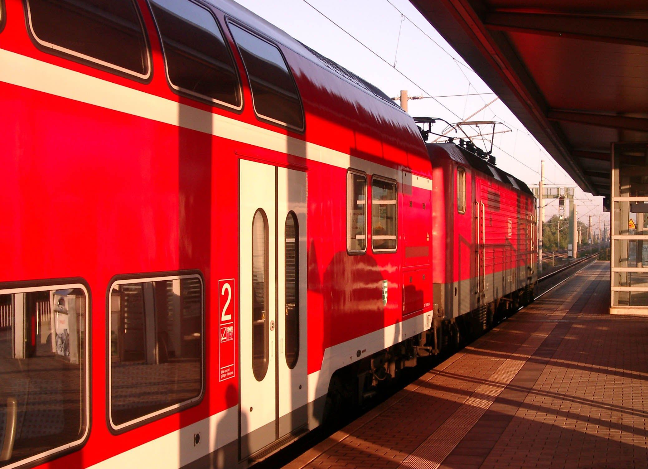 Train Line S2 in Dresden Dobritz